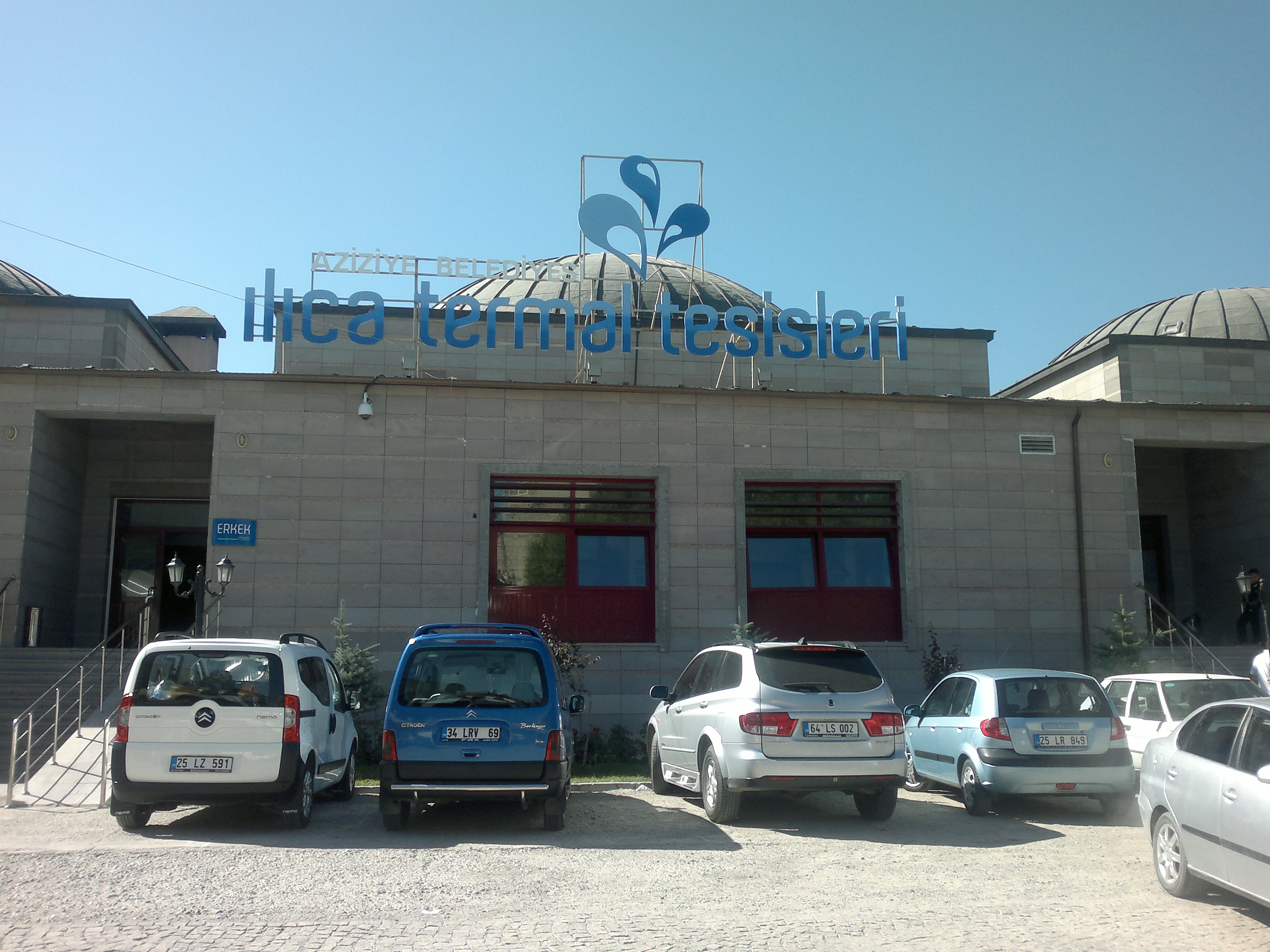 Aziziye Belediyesi Ilıca Termal Tesisleri